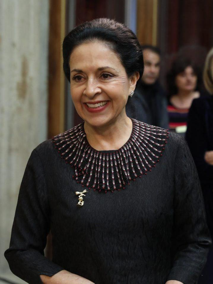 La alcaldesa de Madrid, Manuela Carmena, ha entregado la Llave de Oro de la ciudad al presidente de la República de Ecuador, Lenín Moreno, que se encuentra de viaje de Estado en España.